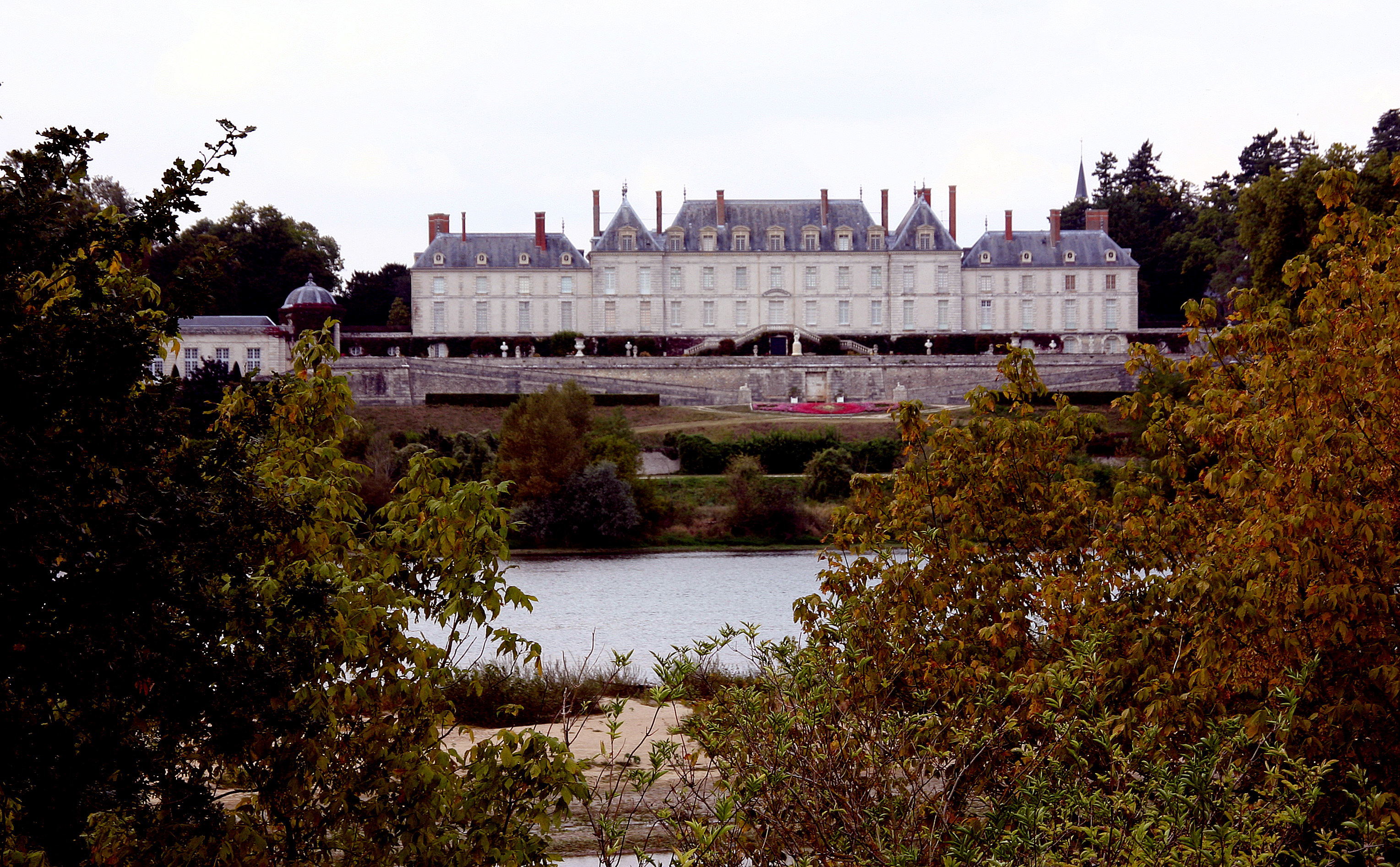 Château de Menars